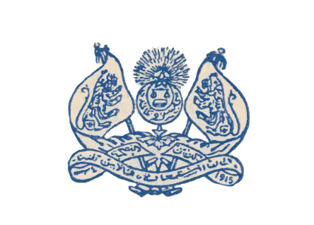 Logo Rasmi MAIK (pertama)